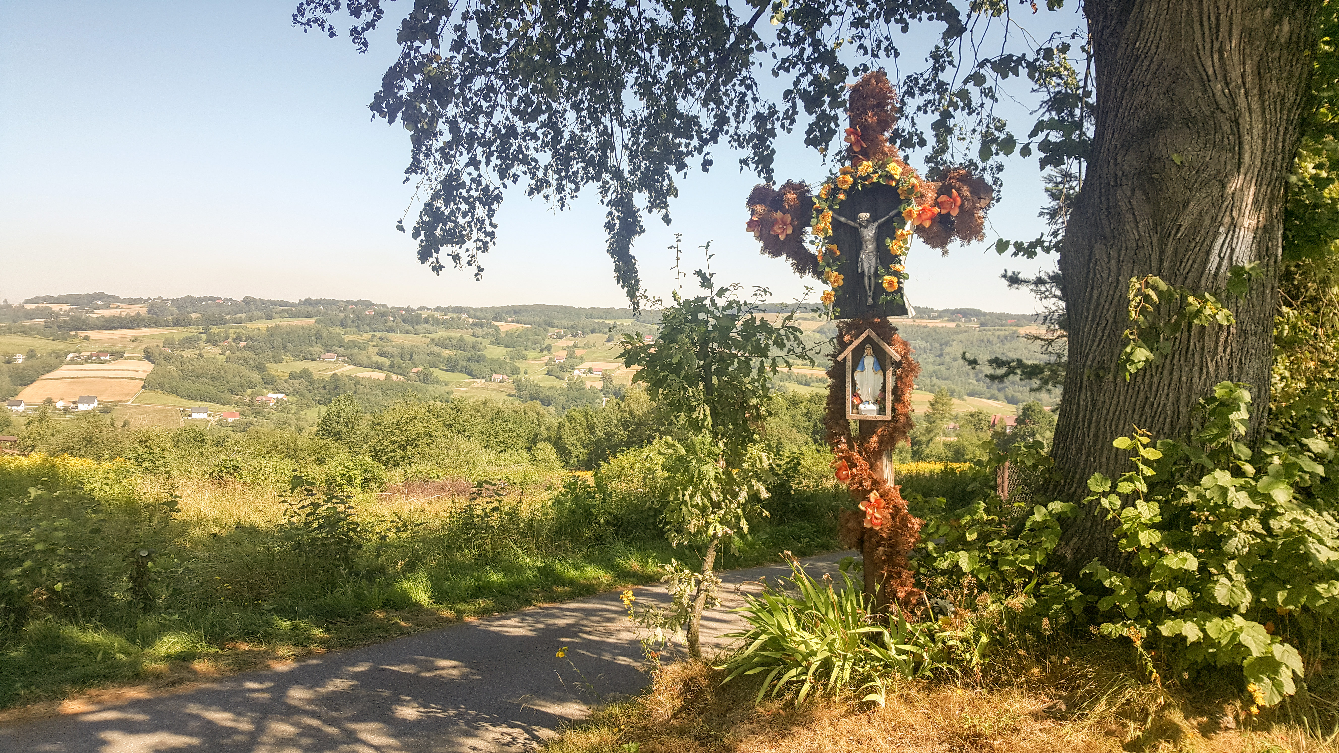 Krzyż przydrożny w Łowczowie (woj. małopolskie)